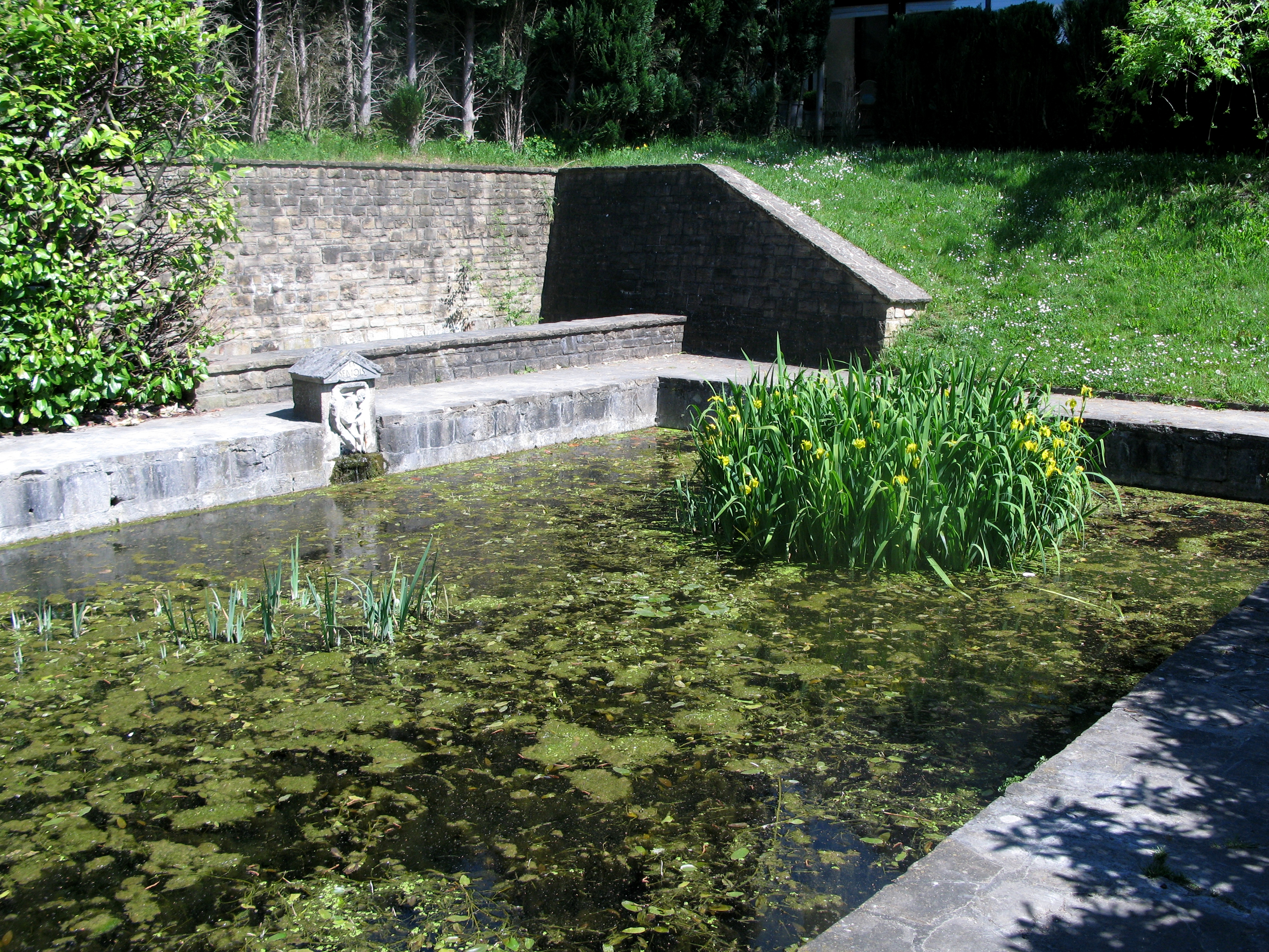 La source de la Semois à Arlon